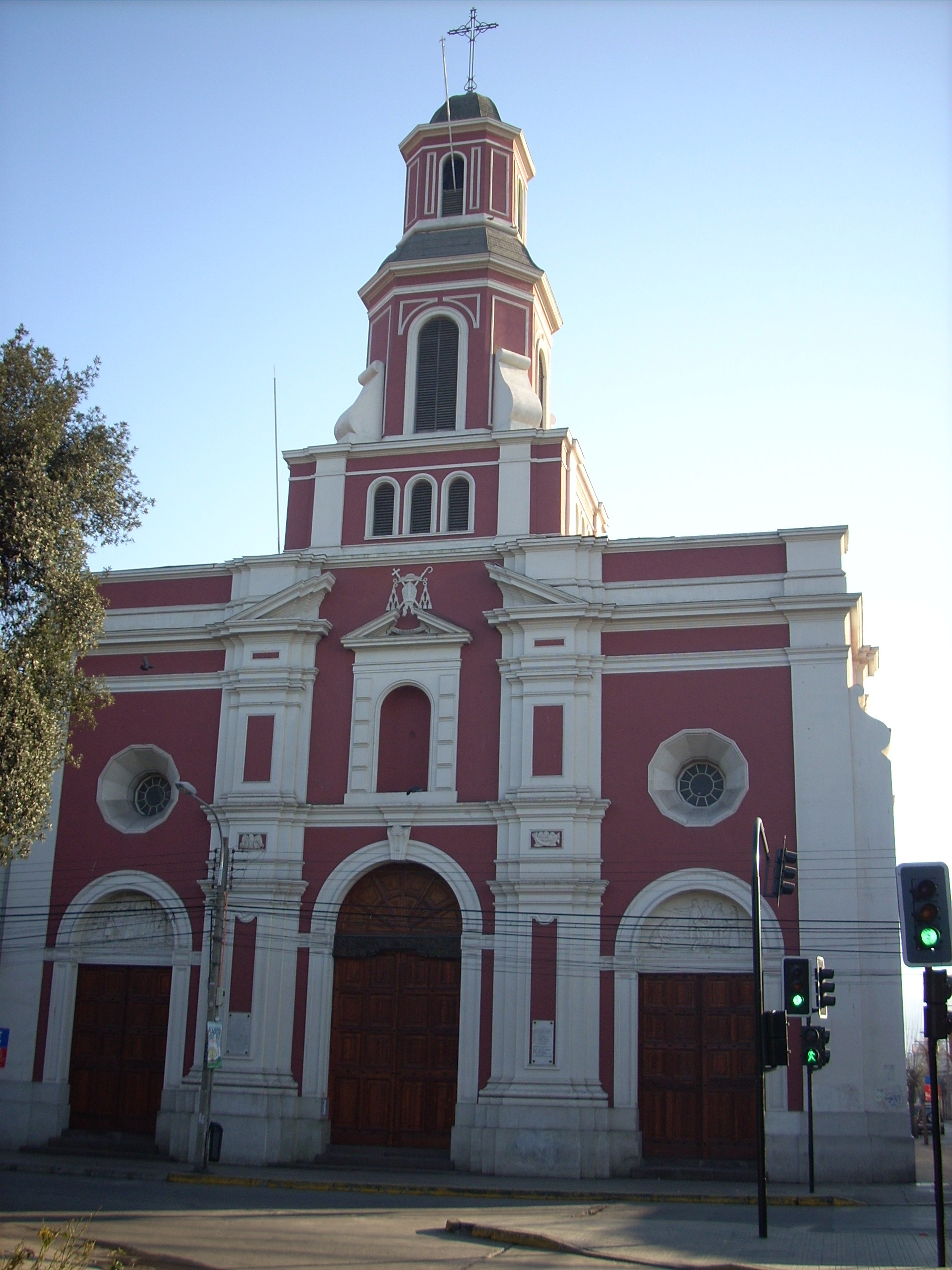 Iglesia Catedral de la Diócesis de San Felipe de Aconcagua, Chile.